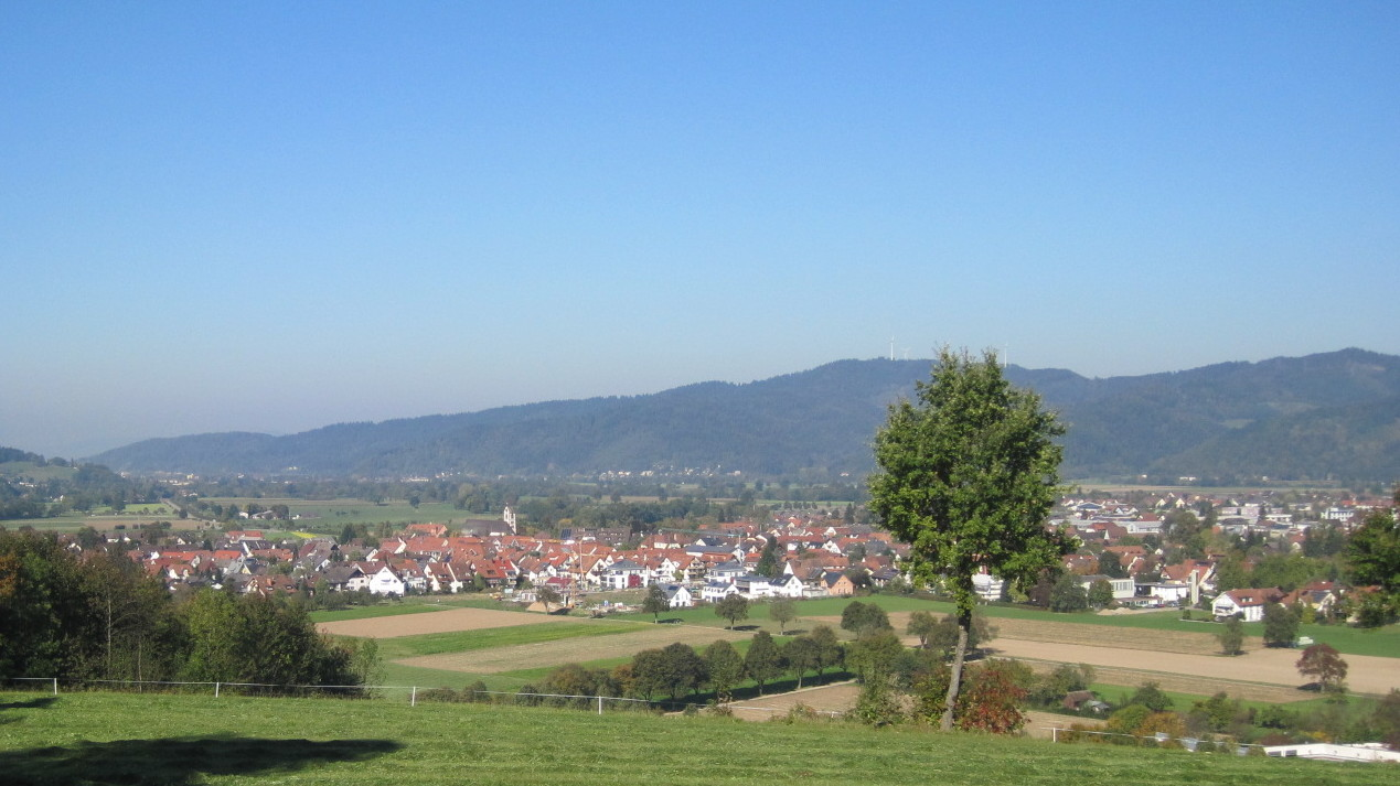 Blick auf Kirchzarten